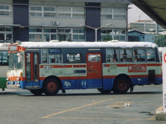 Nara Kotsu Isuzu BA20 at Oyodo Bus Terminal